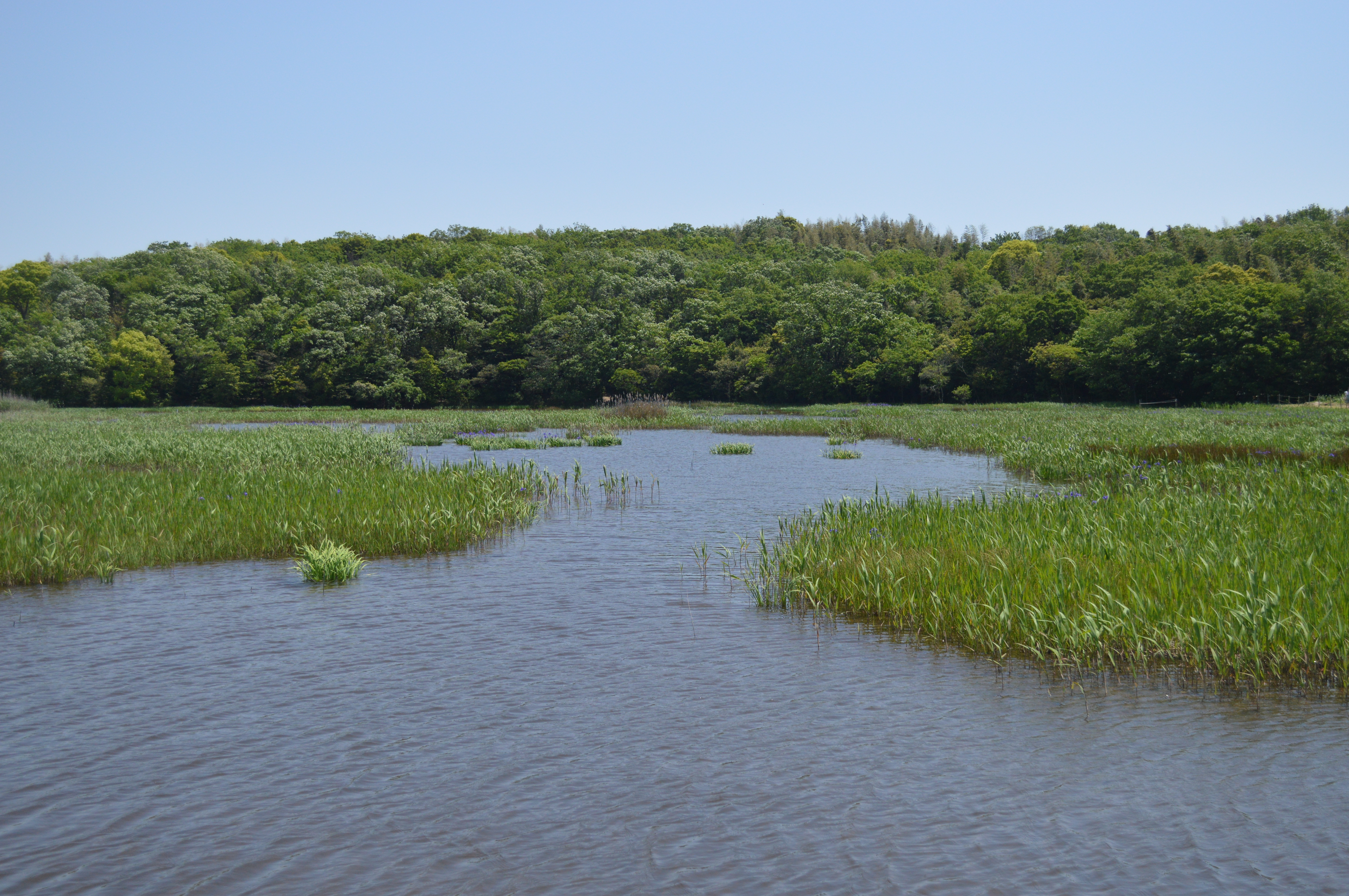 国指定天然記念物である小堤西池のカキツバタ群落、愛知県刈谷市